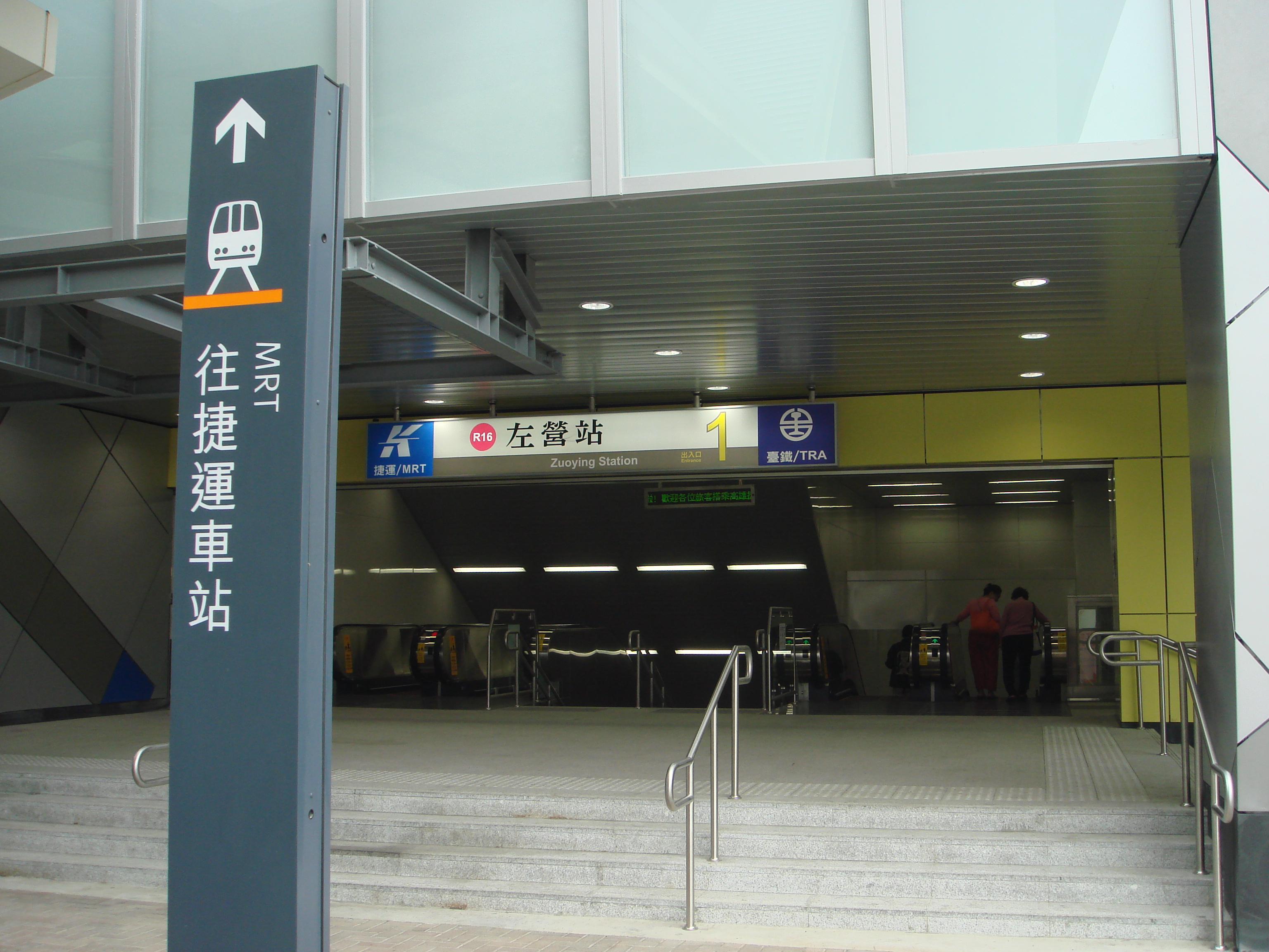 中文（台灣）: 高雄捷運左營站1號出口。